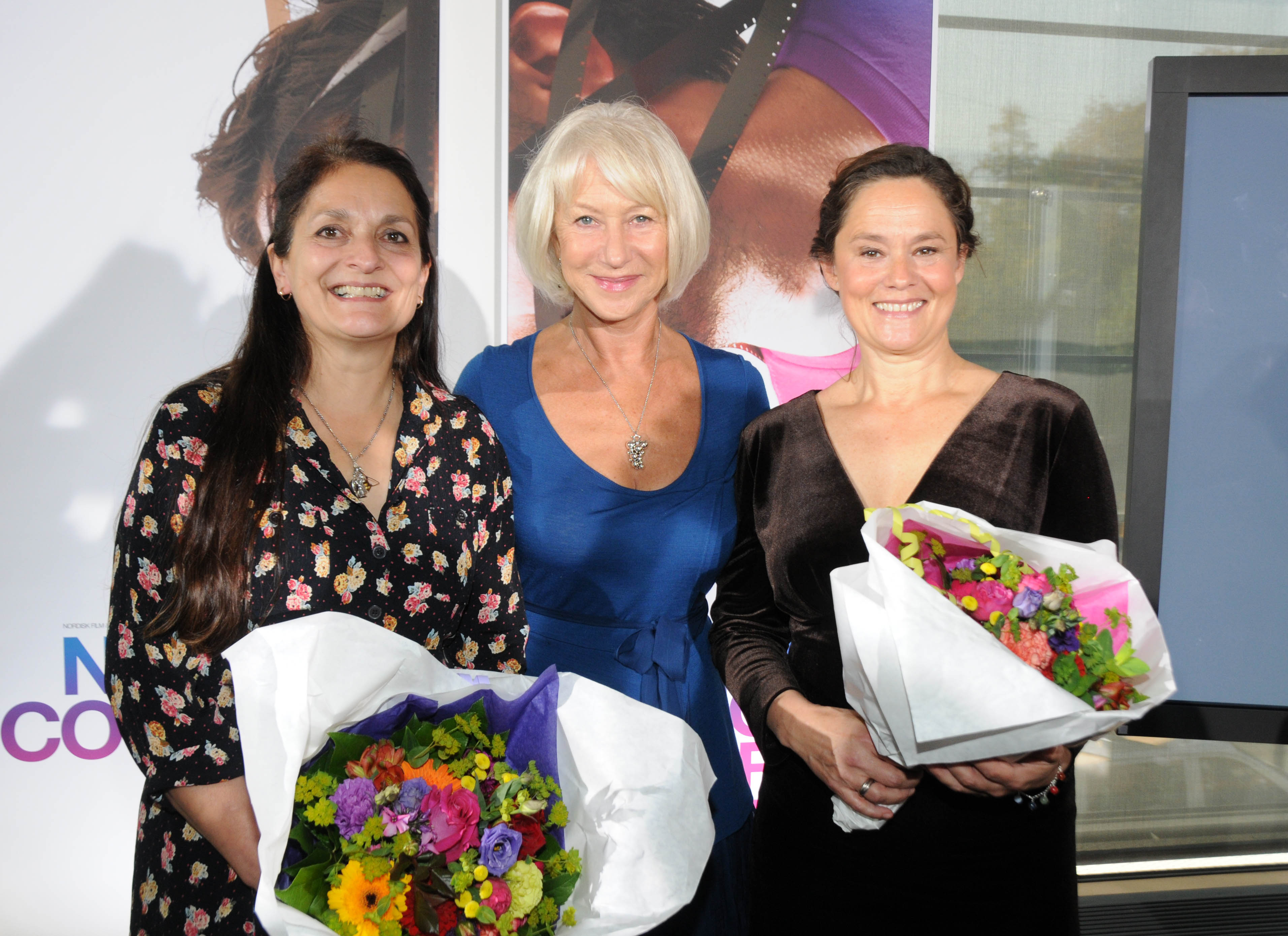 Filminstruktør og manuskriptforfatter Pernilla August, juryformann Helen Mirren og manuskriptforfatter Lolita Ray under offentliggjøringen av mottakerne av Nordisk råds filmpris 2011. August og Ray mottok prisen for filmen Svinalängorna.